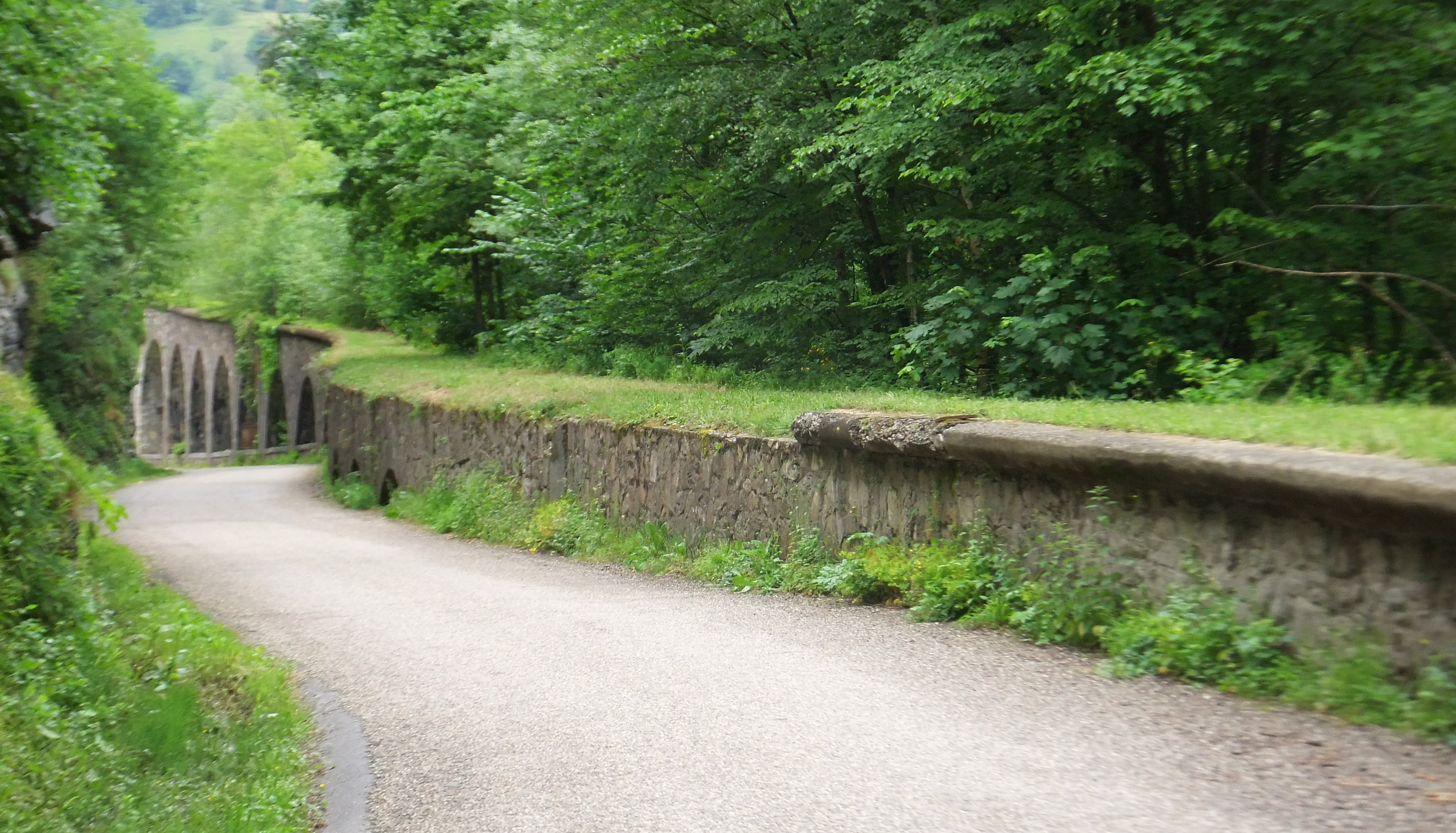 Ancien chemin de fer industriel d'Allevard au Cheylas, dit « Le Tacot » (1873-1972). Arrivée anciennement aux Forges d'Allevard (déménagées au Cheylas en 1974), Dans le fond, on aperçoit la partie en viaduc (le viaduc de la Gorge).